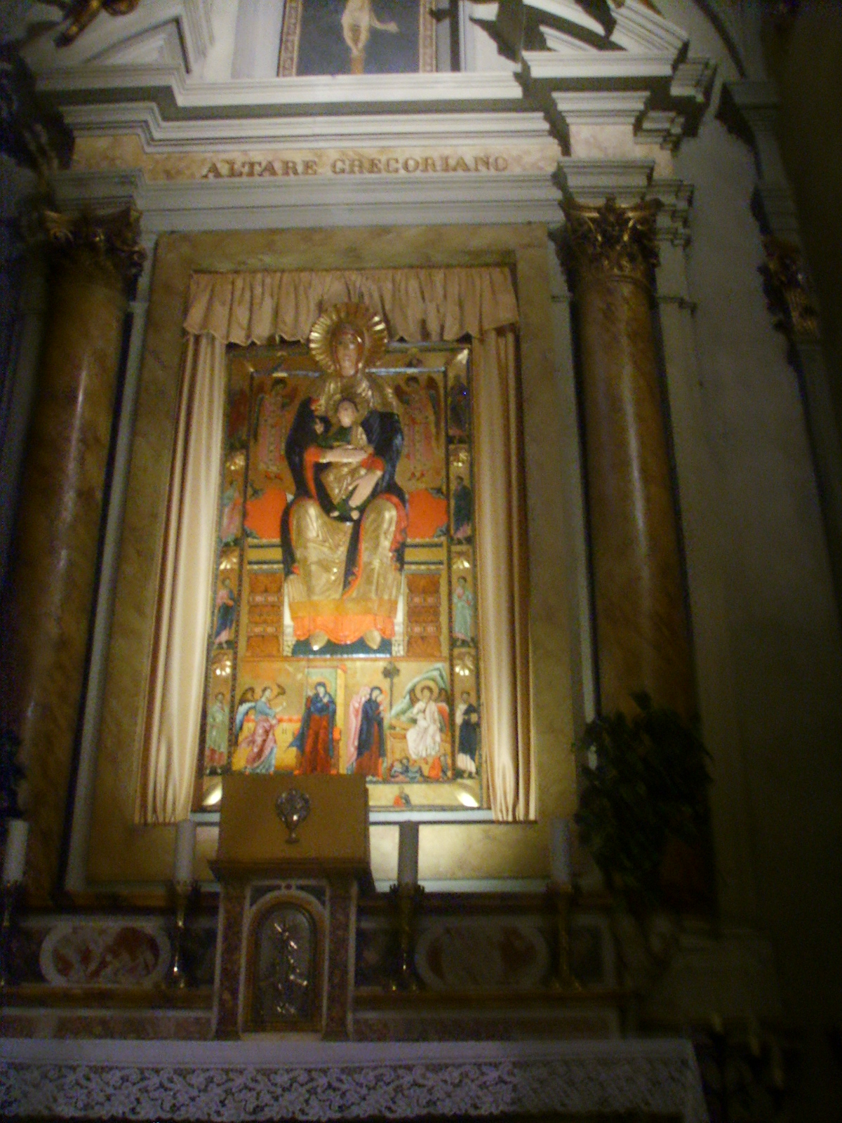 Santa_maria_maggiore madonna_reliquiario in florence italy